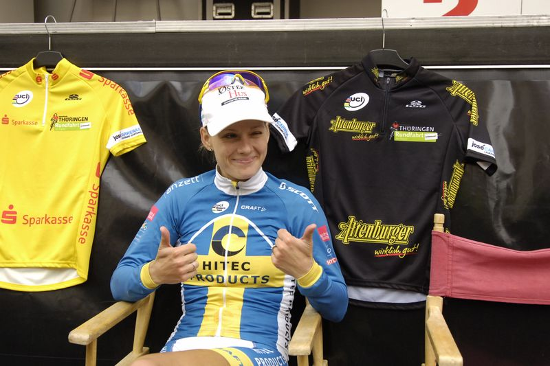 Emma Johansson bei der 6. Etappe der Internationalen Thüringen Rundfahrt der Frauen